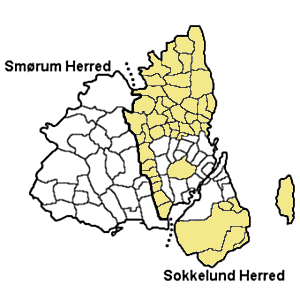 Sokkelund Herred Københavs Amt, Denmark Map by Svend-Erik Christiansen edit by Nico-dk/Nils Jepsen